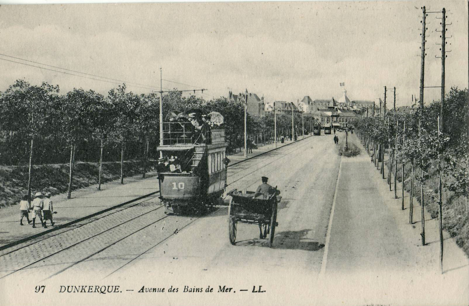 Carte postale ancienne éditée par LL, n°97 : DUNKERQUE - Avenue des Bains de Mer. Gros plan sur une motrice électrique à accumulateurs et impériale du tramway de Dunkerque circulant sur l'avenue des Bains de Mer. La caténaire des nouveaux tramways à captage électrique aérien est déjà installée.